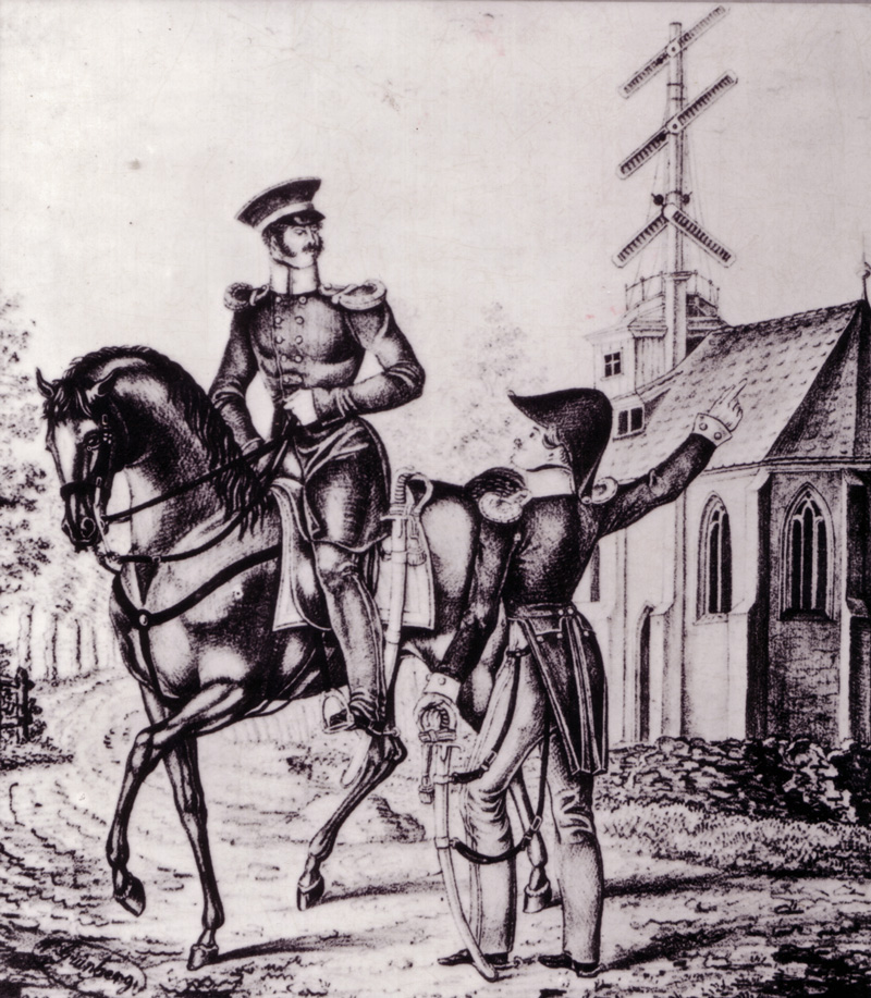 Prussian Optical Telegrapg No 2 in Berlin-Dahlem